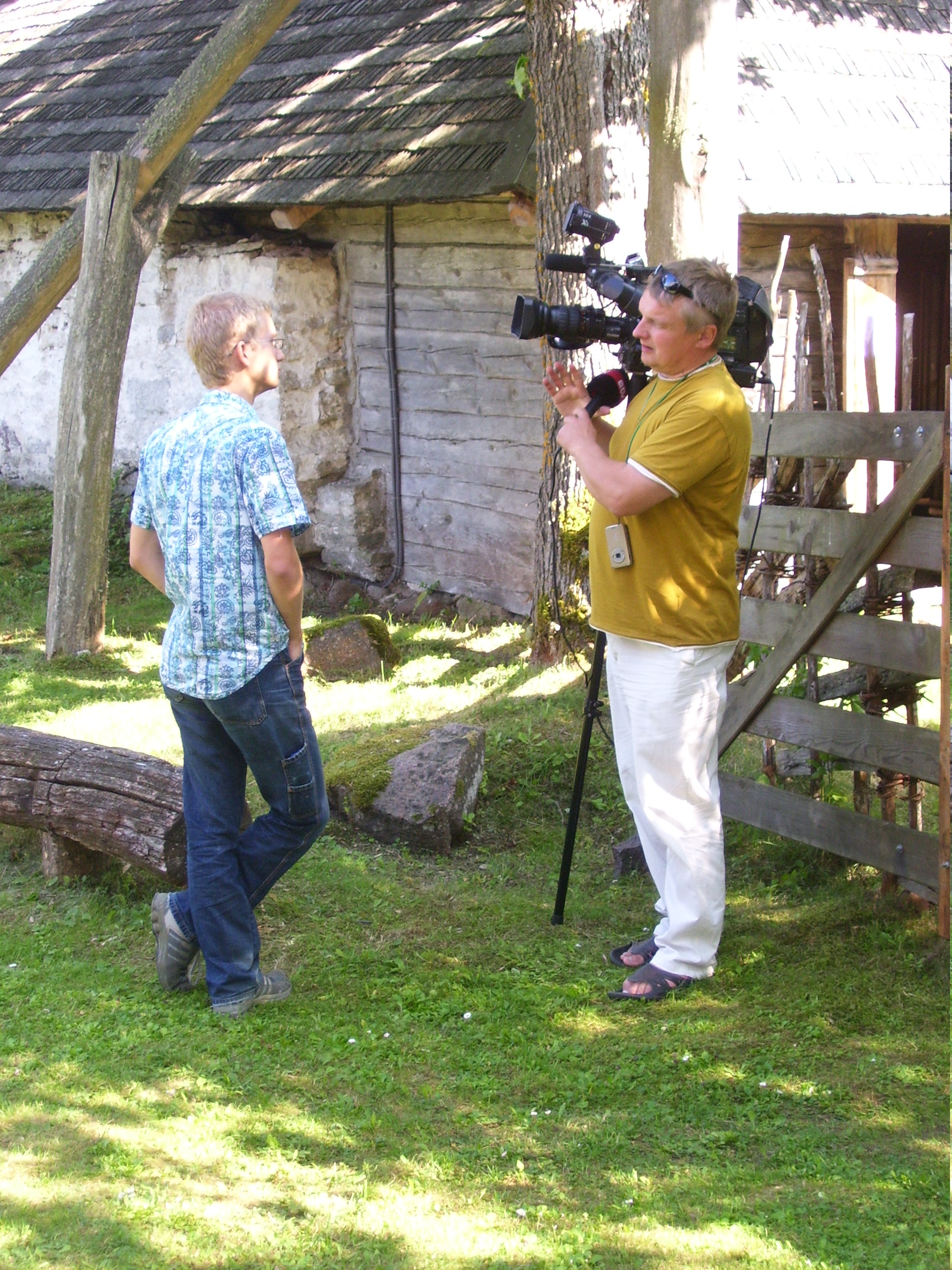 Margus Muld intervjueerimas eestikeelse Vikipeedia esindajat 6. augustil 2009 Saaremaal Viki külas toimunud vikipedistide kokkutuleku asjus.